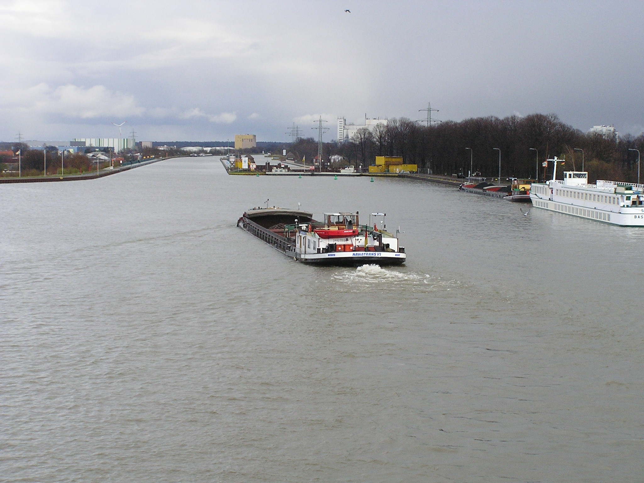 Mittellandkanal am Wasserstraßenkreuz Minden mit Baustelle Weserstraße. Rechts die alte Fahrt, links die neue Kanalbrücke über die Weser.